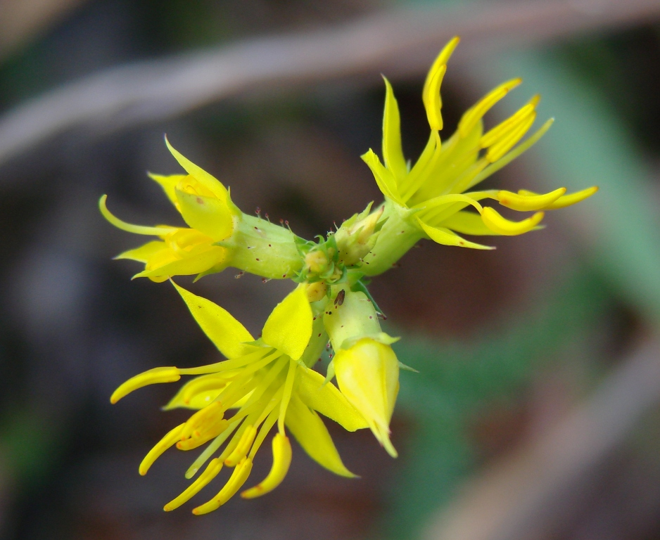 Cambessedesia espora - MELASTOMATACEAE - Parque Olhos D'Água - Brasília - Distrito Federal - Brasil.